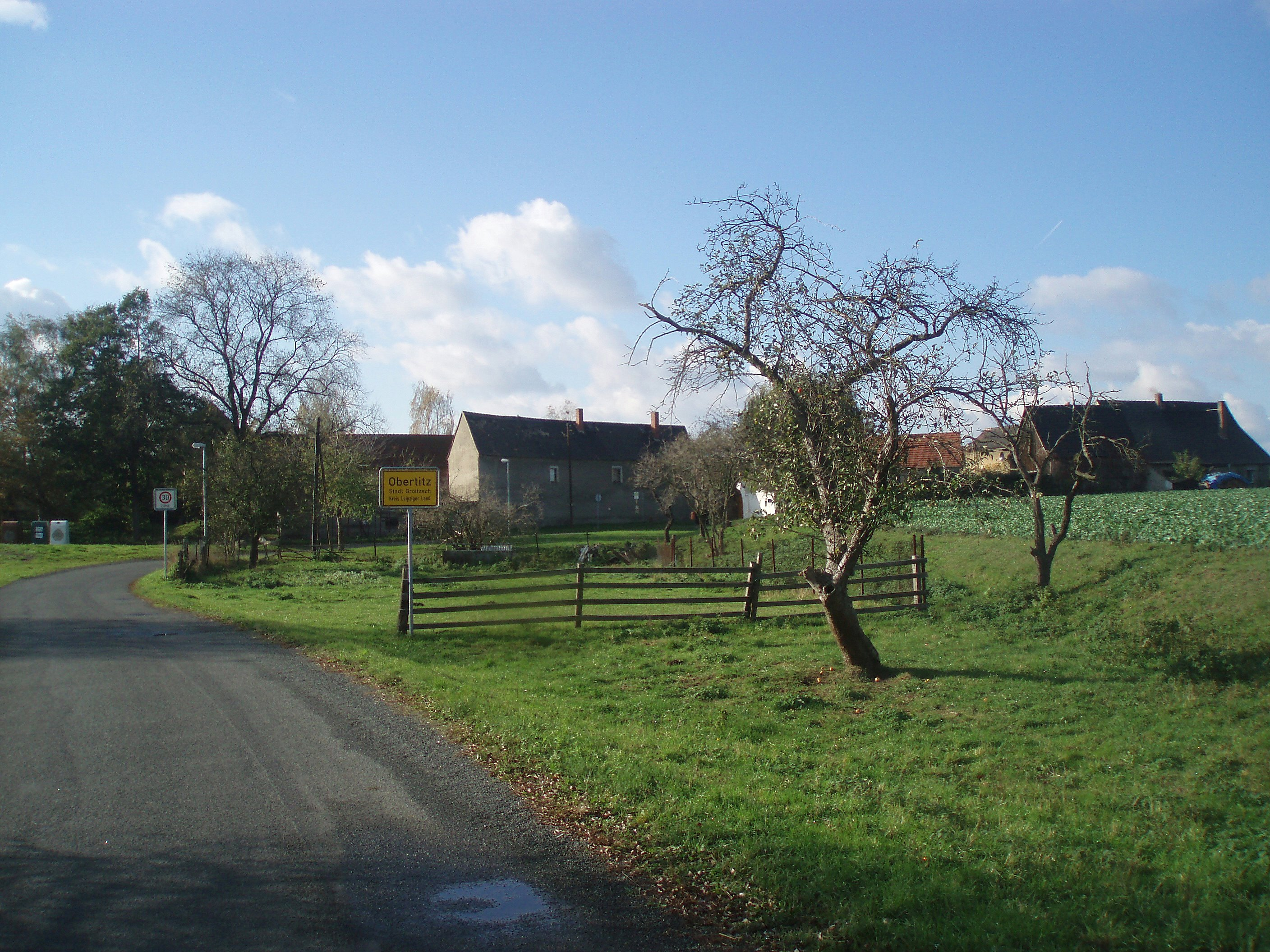 Ortseingang Obertitz, Ortsteil von Groitzsch in Sachsen, mit Schnauderaue